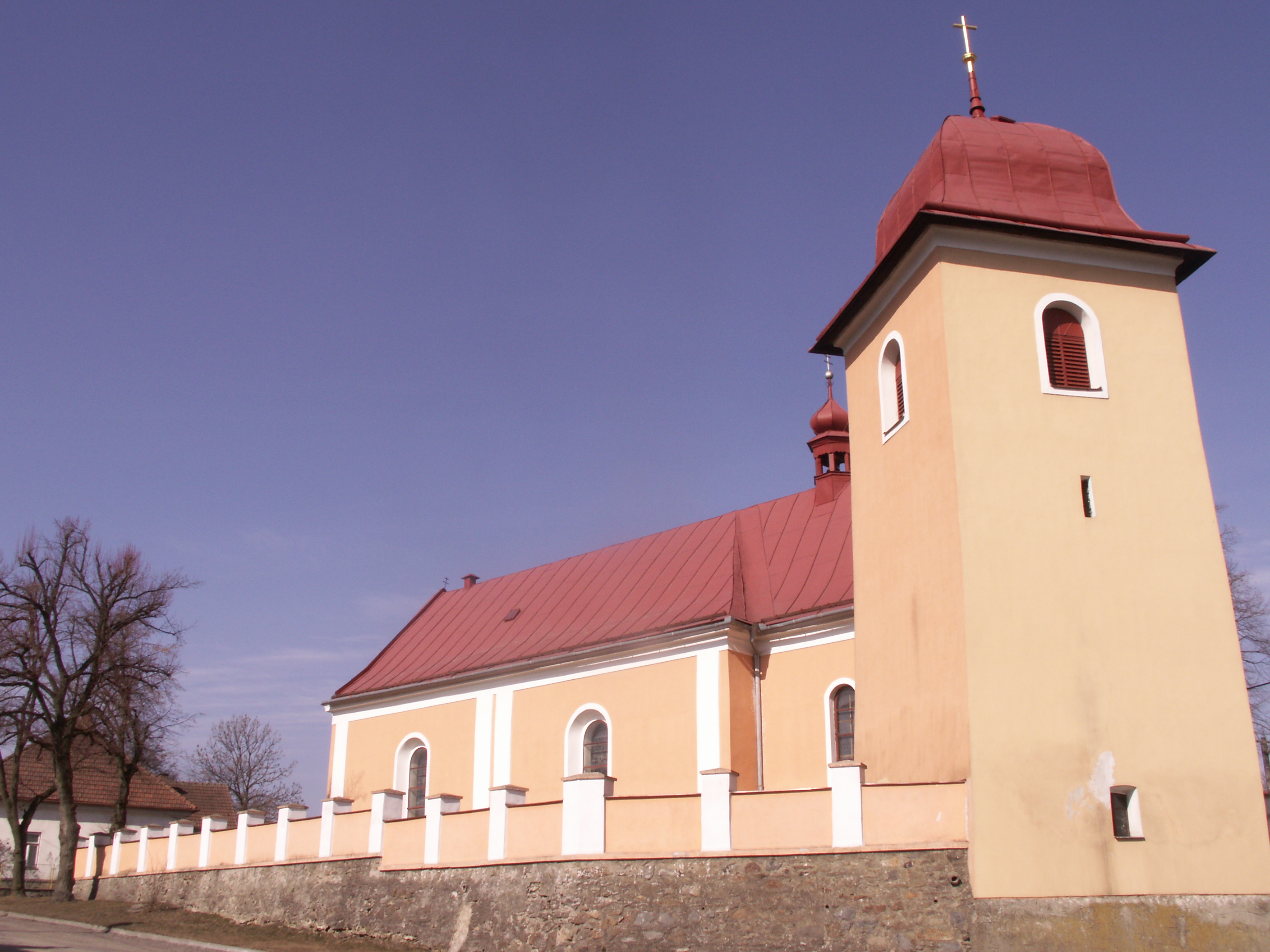 kostel sv. Jakuba a Filipa v Pavlově, okres Žďár nad Sázavou, kraj Vysočina